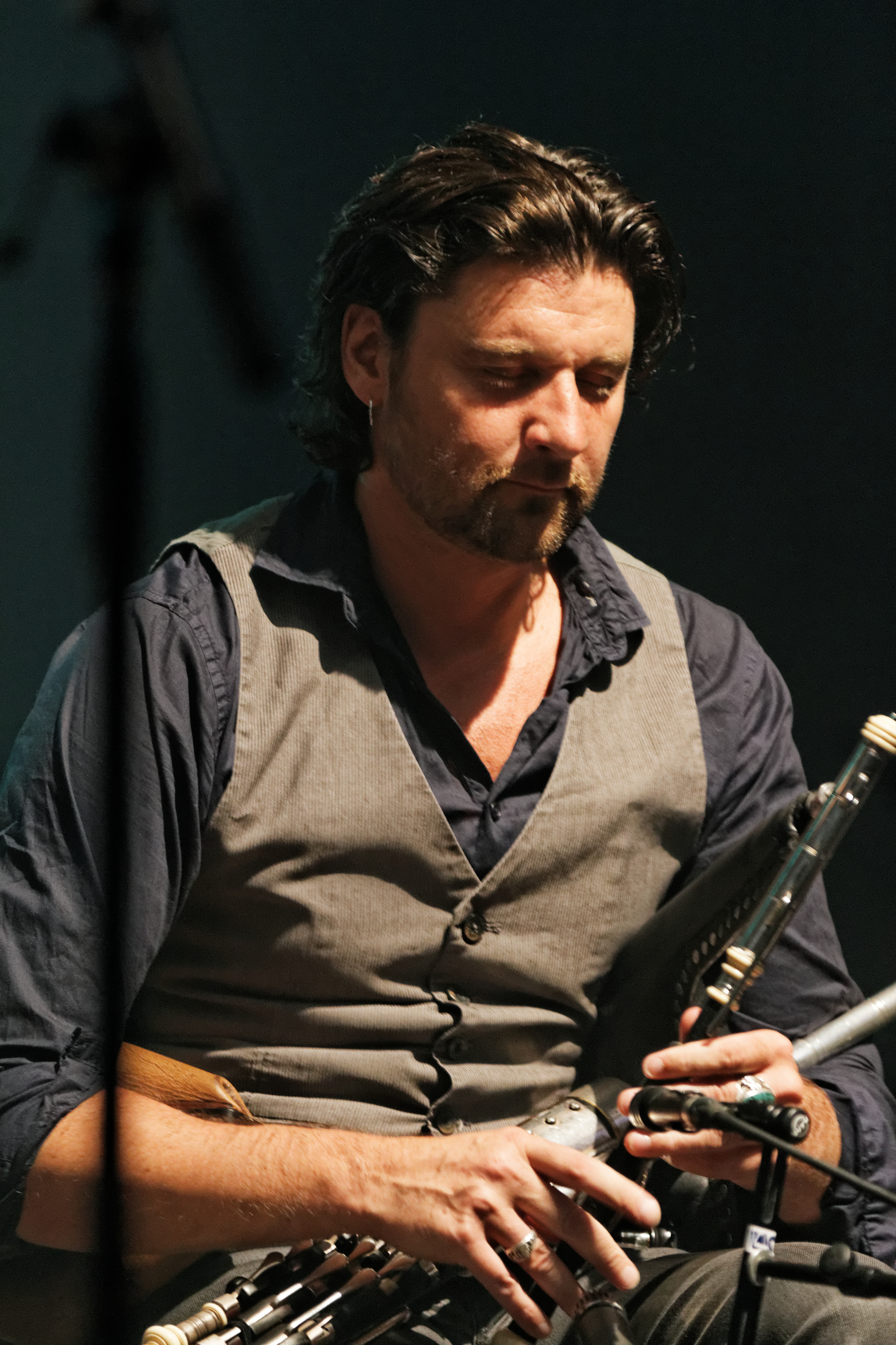 Dan ar Braz en concert sur la scène Gradlon lors du festival de Cornouaille 2013.